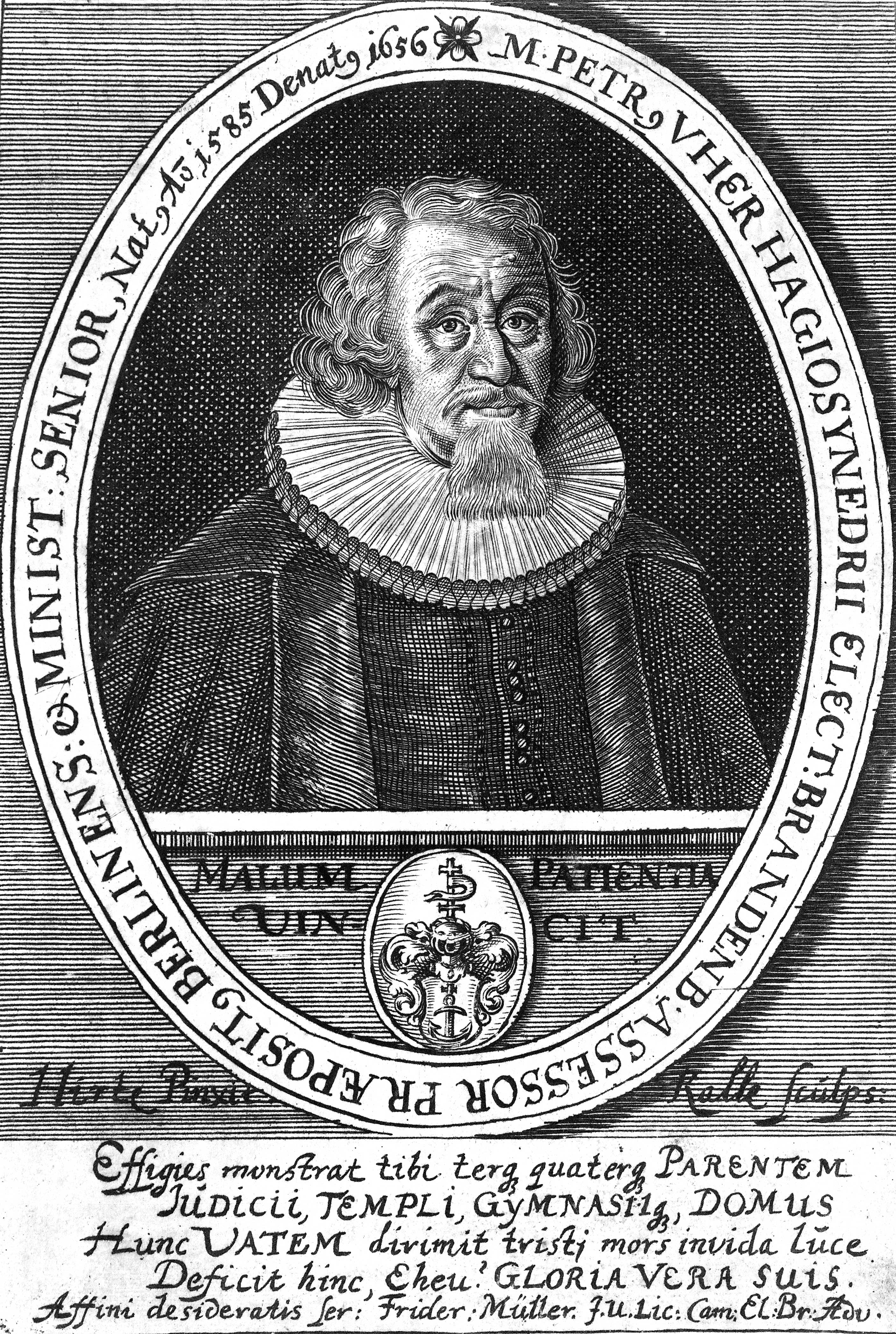 Bildnis des Peter Vher (d. Ä.) Kupferstich, 176 x 122 mm (Blatt) Halberstadt, Gleimhaus, Inventar-Nr. P3 Uher 1, alte Inventar-Nr. Ca 2696, alte Katalog-Nr. a.B.